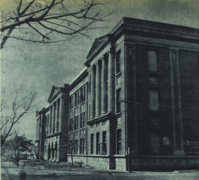 1950年的沈阳农学院